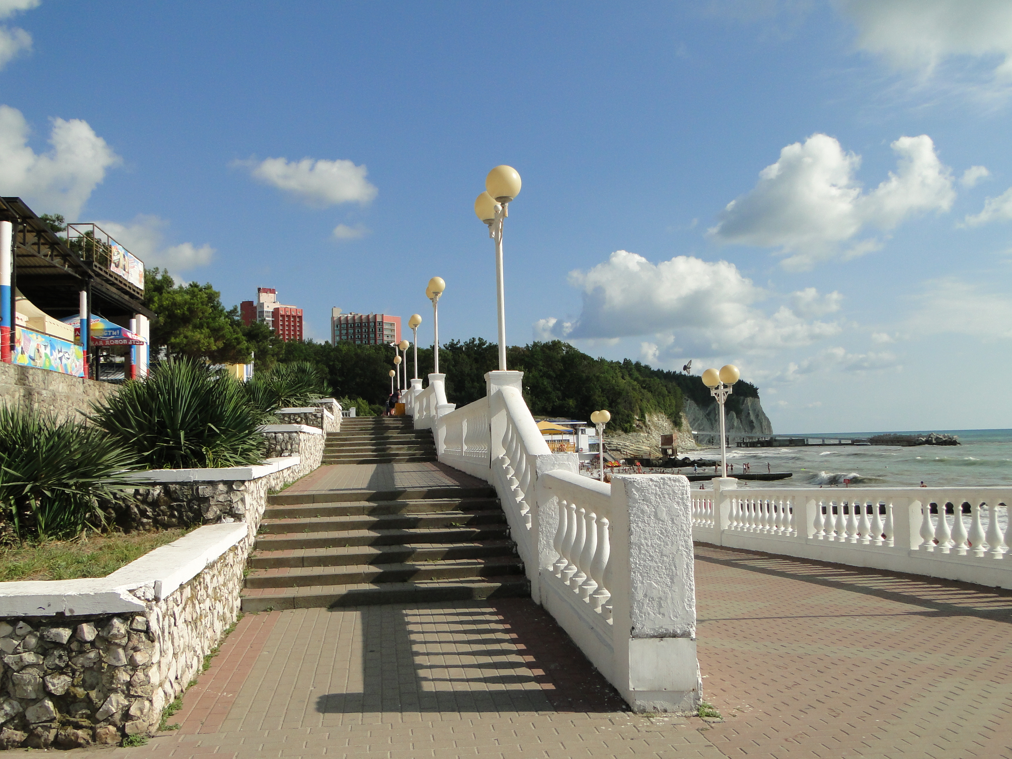 Набережная